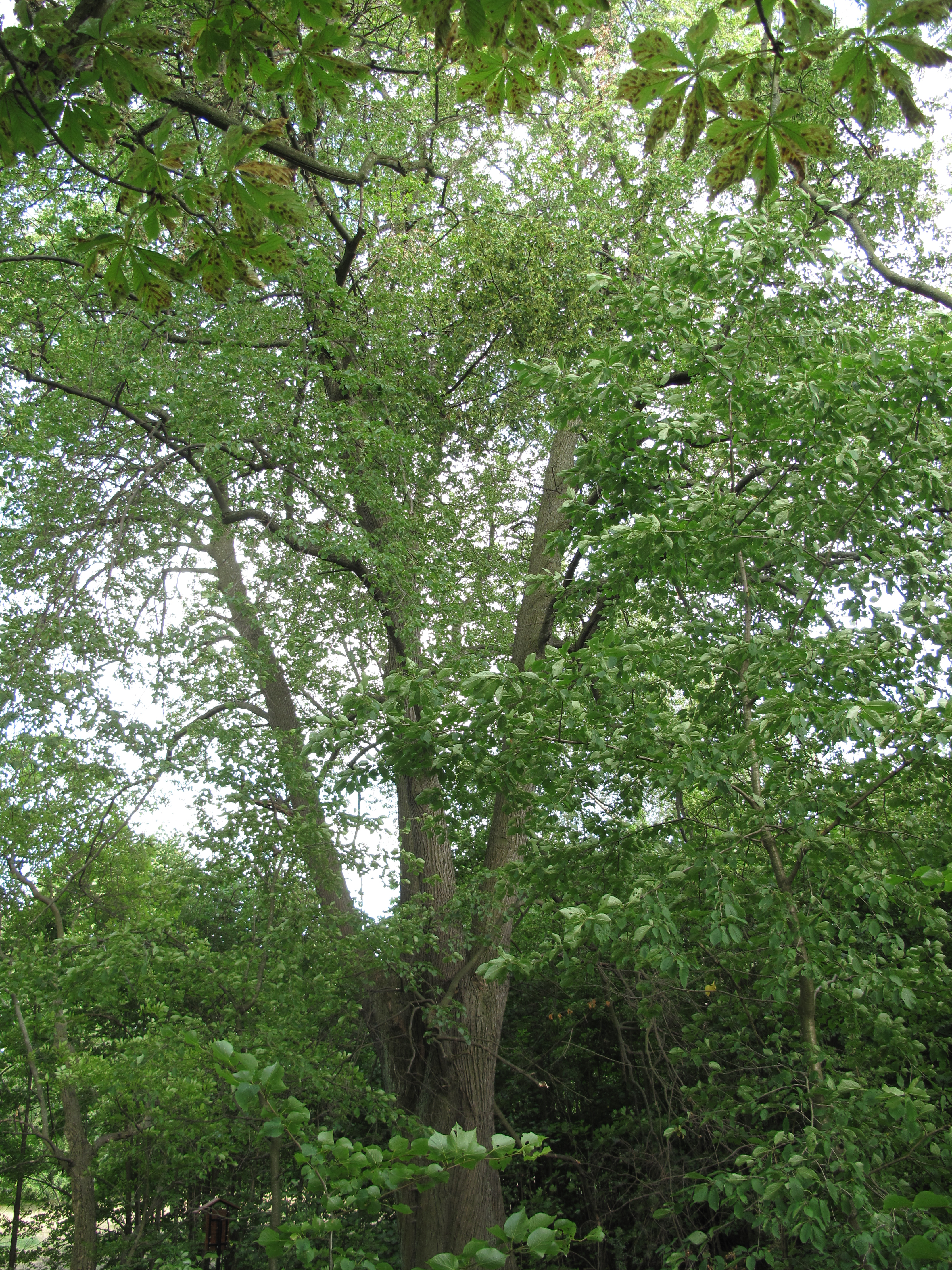 Památný strom Pertoltická lípa (u Václavíků) v Pertolticích, Česká republika.